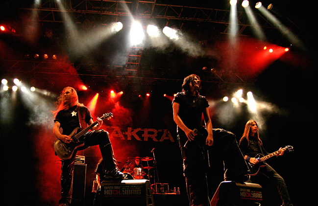 Shakra am Openair Hochybrig 2006